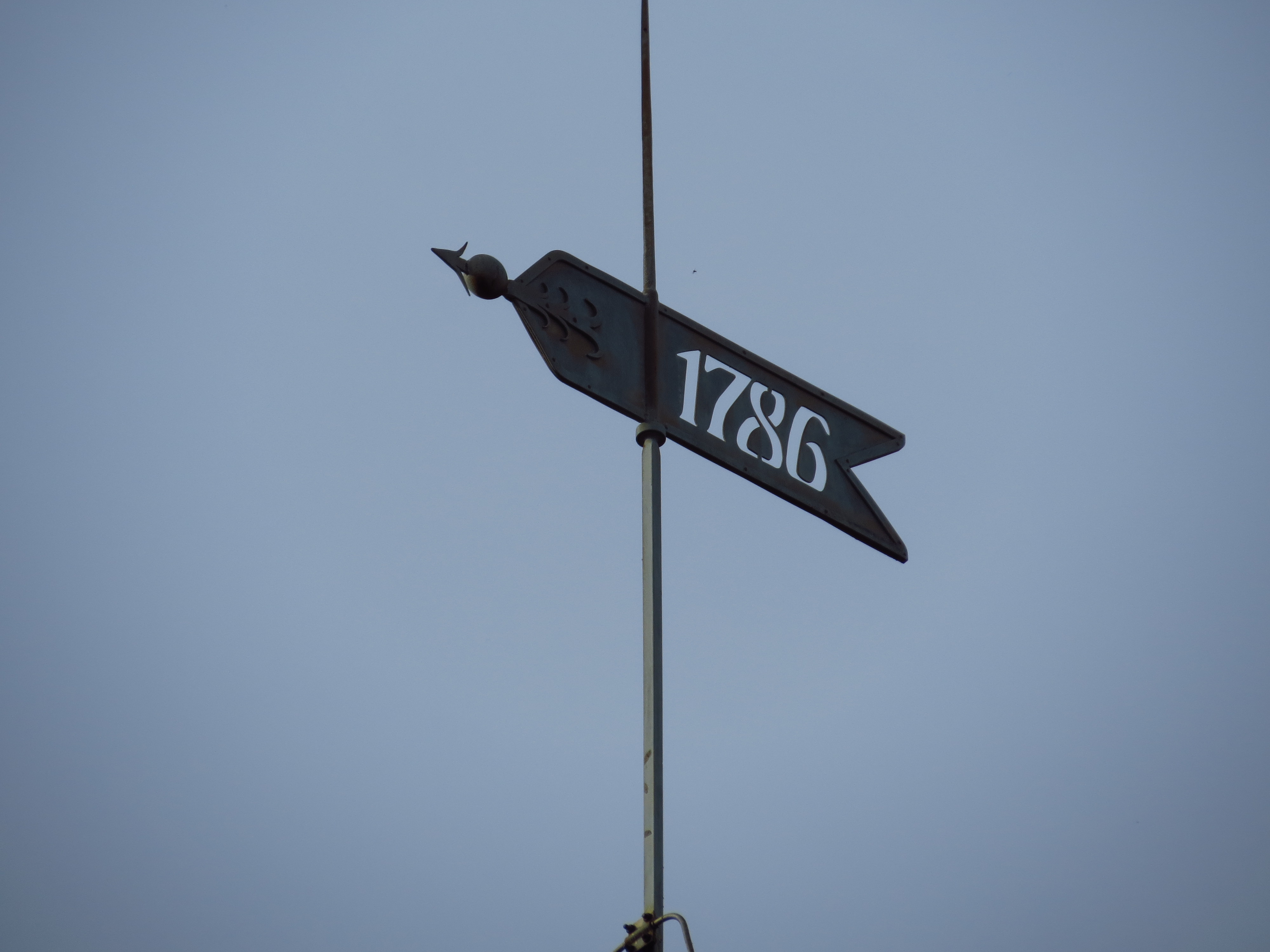 Dorfkirche Leibchel, Windfahne auf dem Turm von 1786, Leibchel, Ortsteil der Gemeinde, Märkische Heide im Landkreis Dahme-Spreewald, Brandenburg, Deutschland